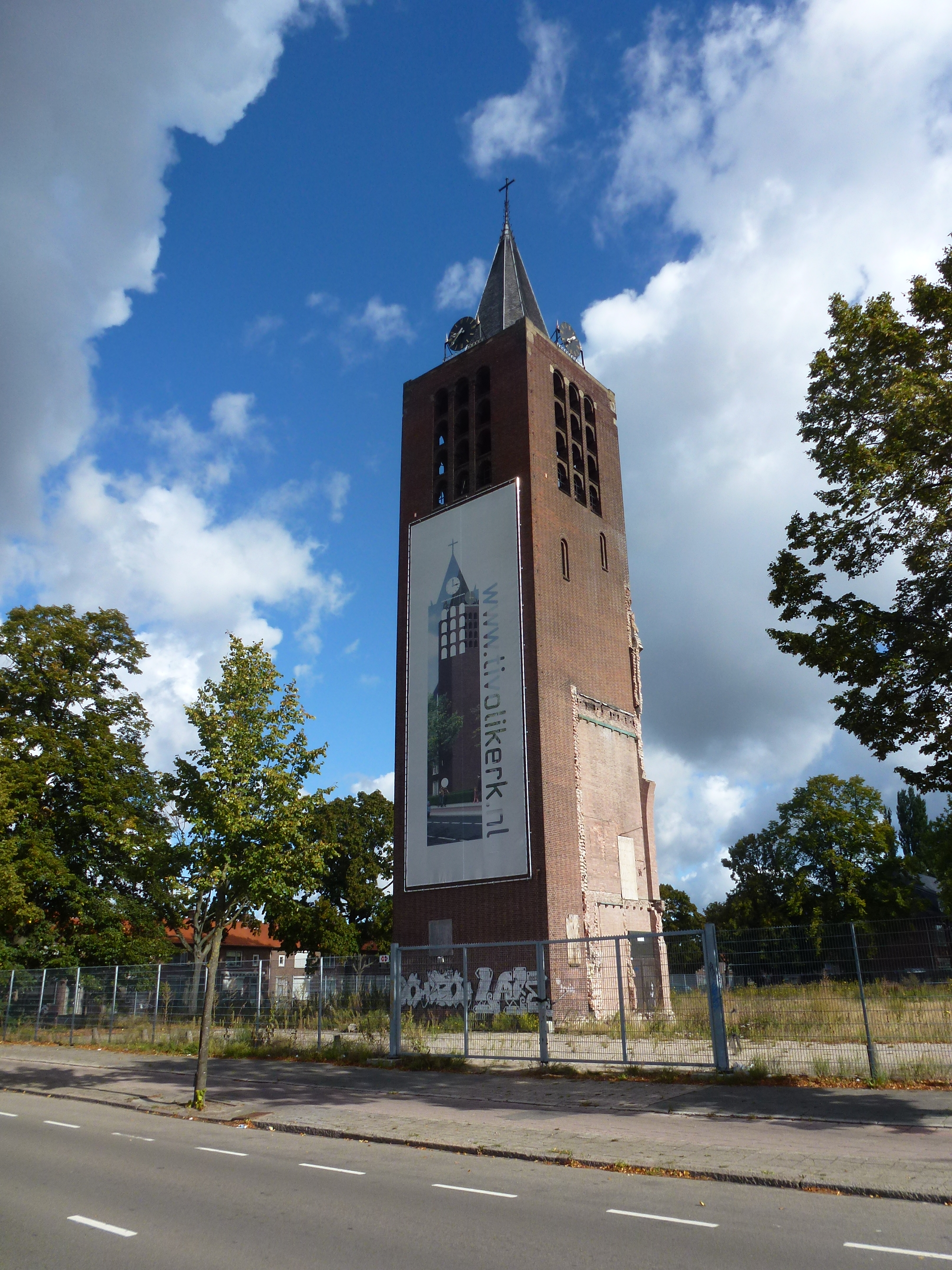 Toren Tivolikerk Eindhoven situatie september 2012. Officiële naam van de kerk was R.K. St. Jozefkerk